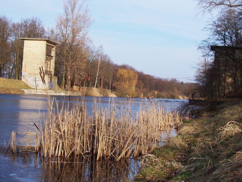 Elster-Saale-Kanal, Sicherheitstor Ost bei Burghausen